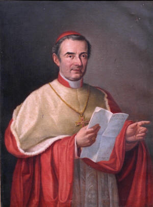 1838 De Angelis montefiascone